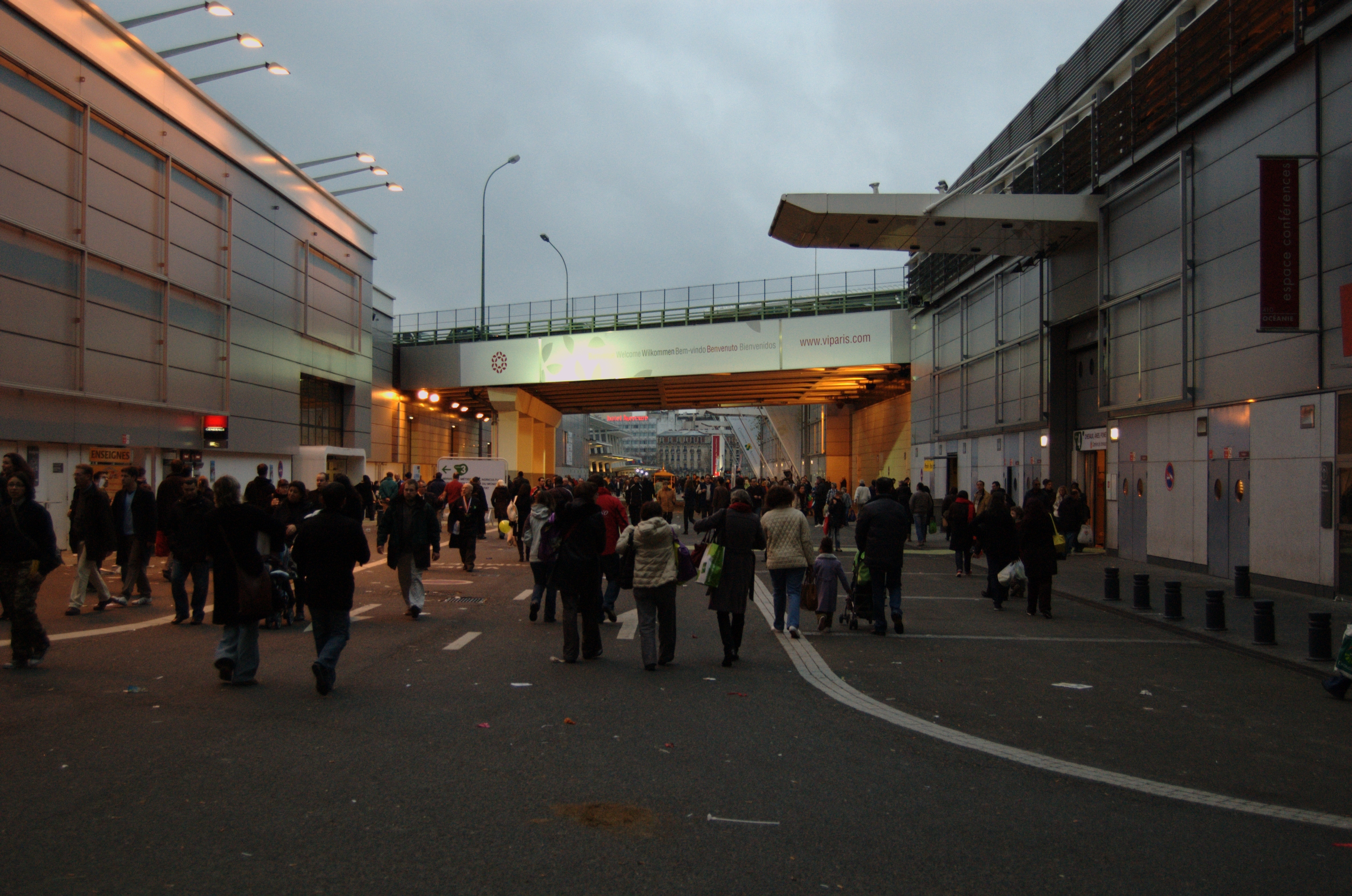 Parc des expositions de la porte de Versaille lors du Salon international de l'agriculture 2009 - Paris - France - 22 février 2009.